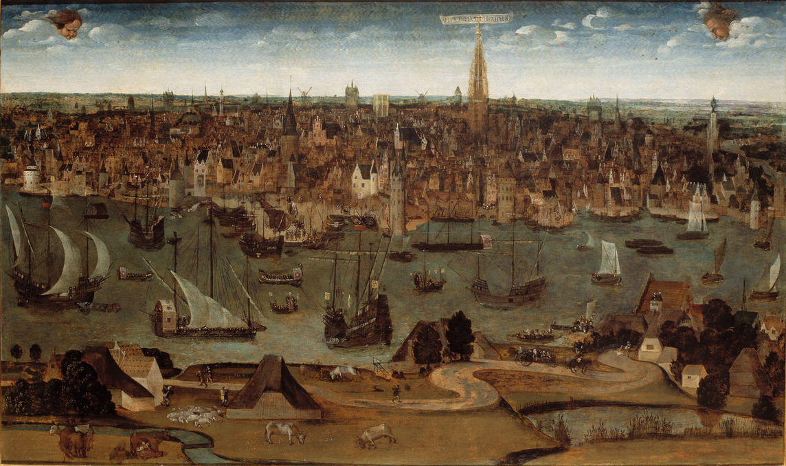 Antwerpia in Brabancia, anoniem, ca 1540, MAS